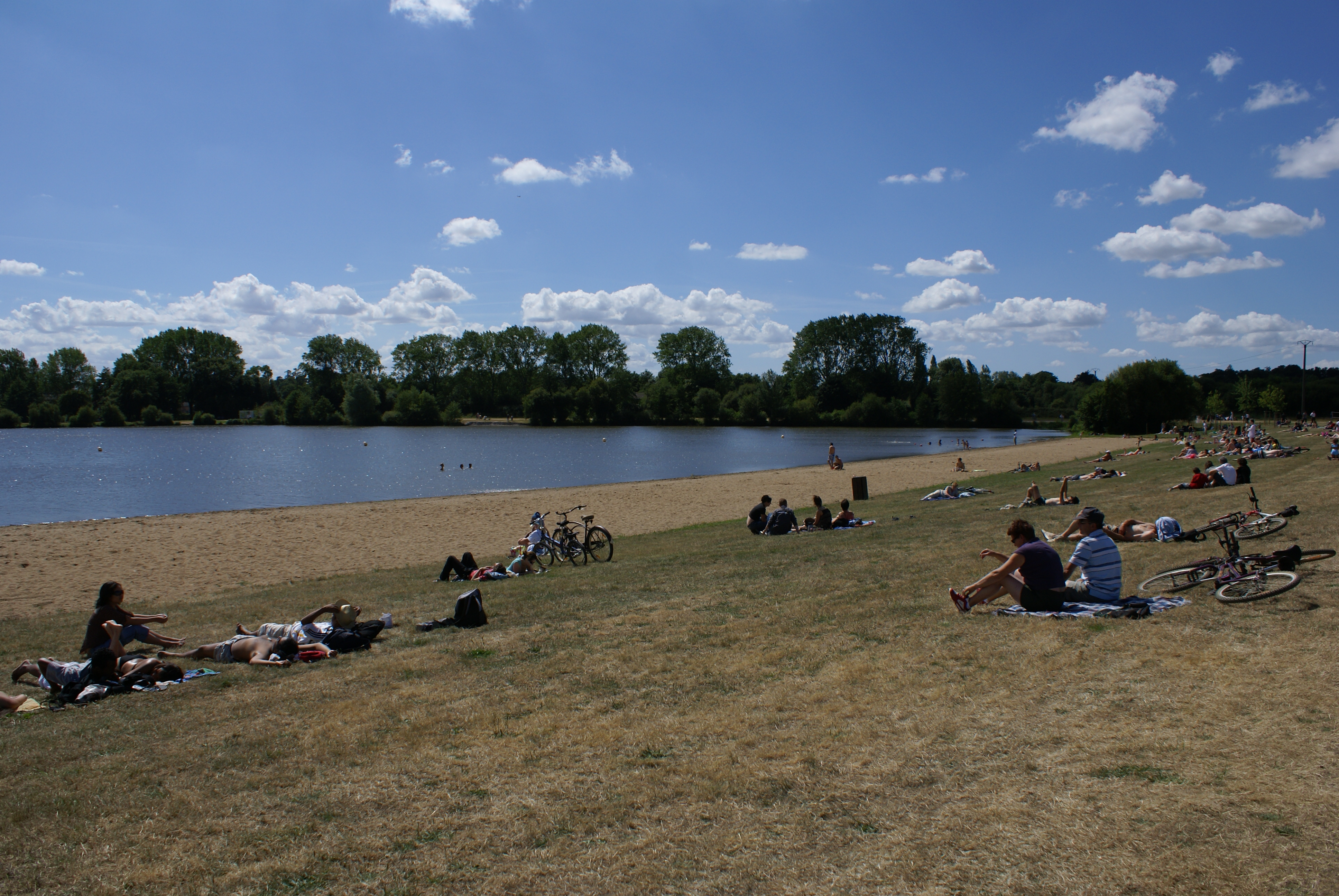 Les étangs d'Apigné au sud de Rennes sont aussi appelés « plages de Rennes ».